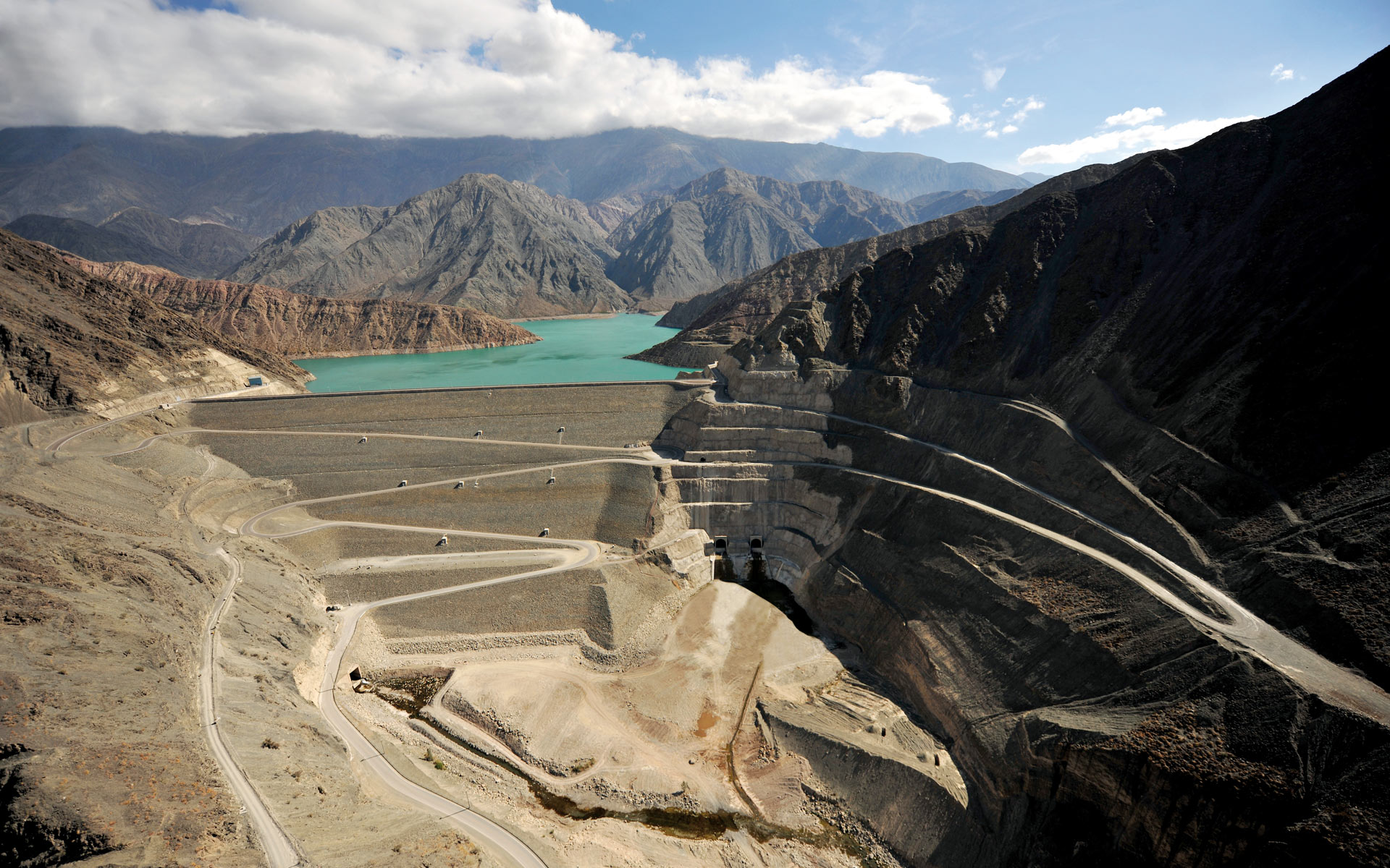 Se puede ver la presa y atrás el embalse de Caracoles